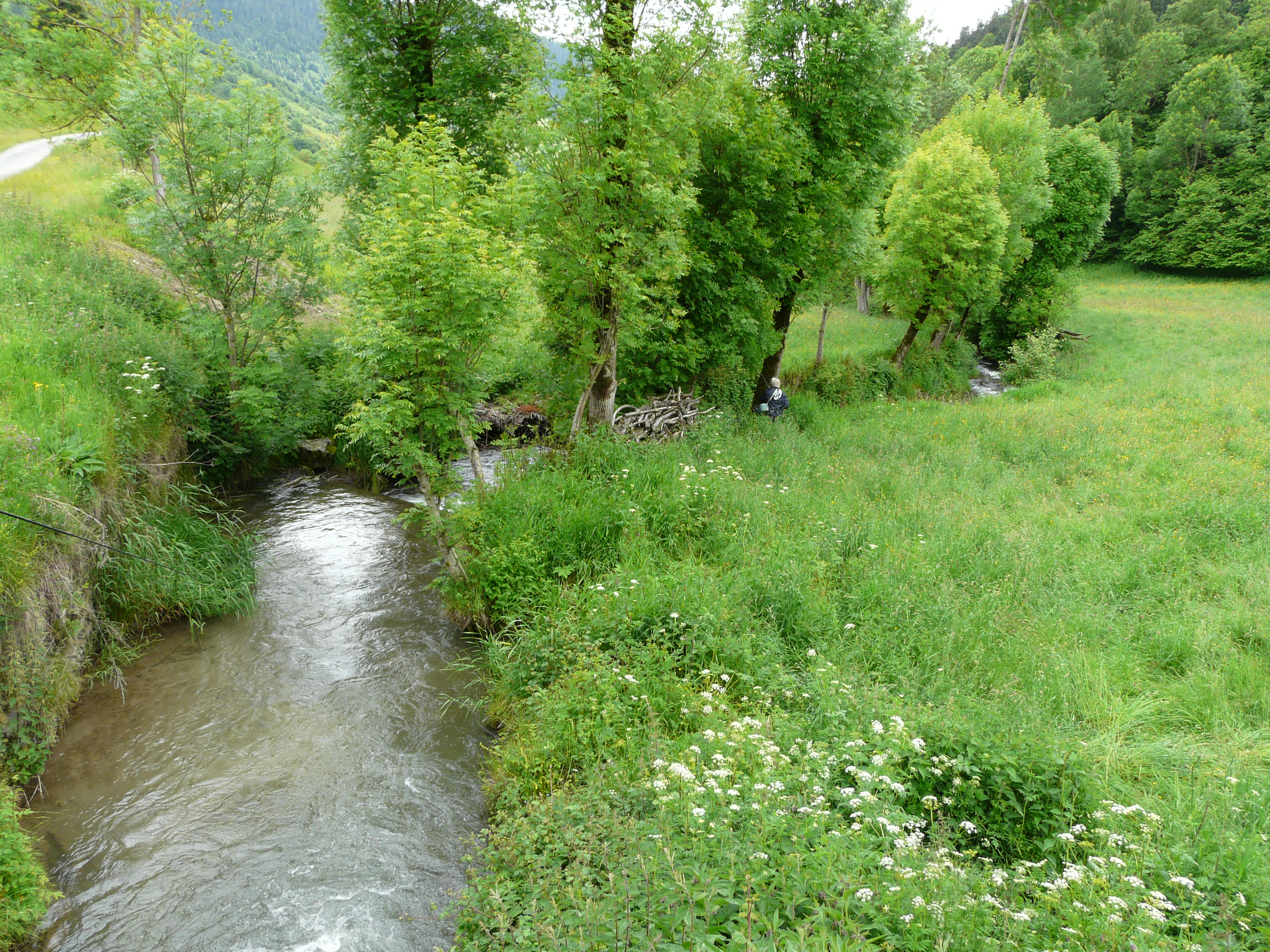 La Neste d'Oueil à l'ouest du village de Mayrègne, Haute-Garonne, France. Vue prise en direction de l'aval.